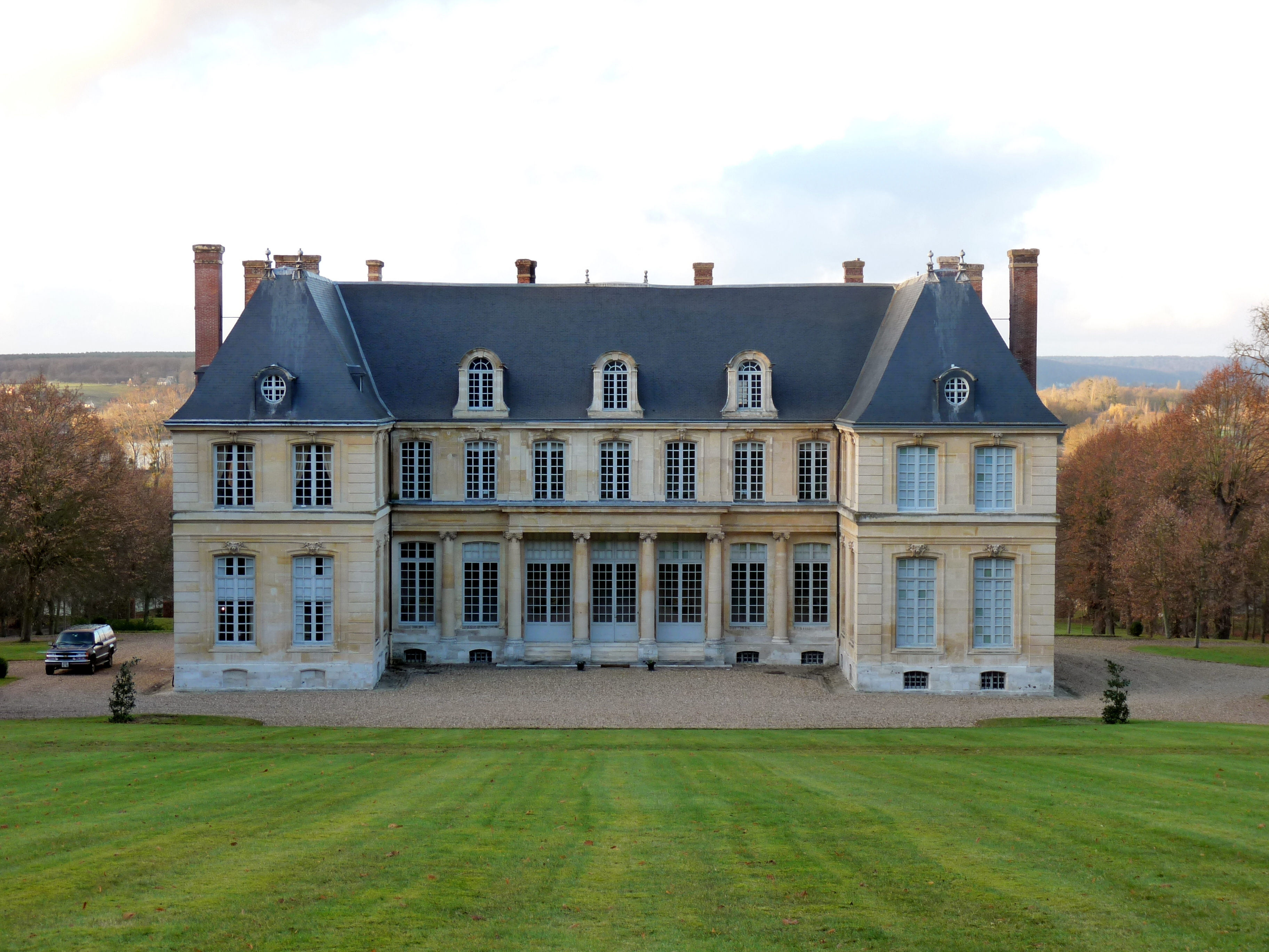 Château d'Yville (InscritInscrit) This building is indexed in the Base Mérimée, a database of architectural heritage maintained by the French Ministry of Culture, under the references PA00101093 , PA76000058 and PA27000052 .